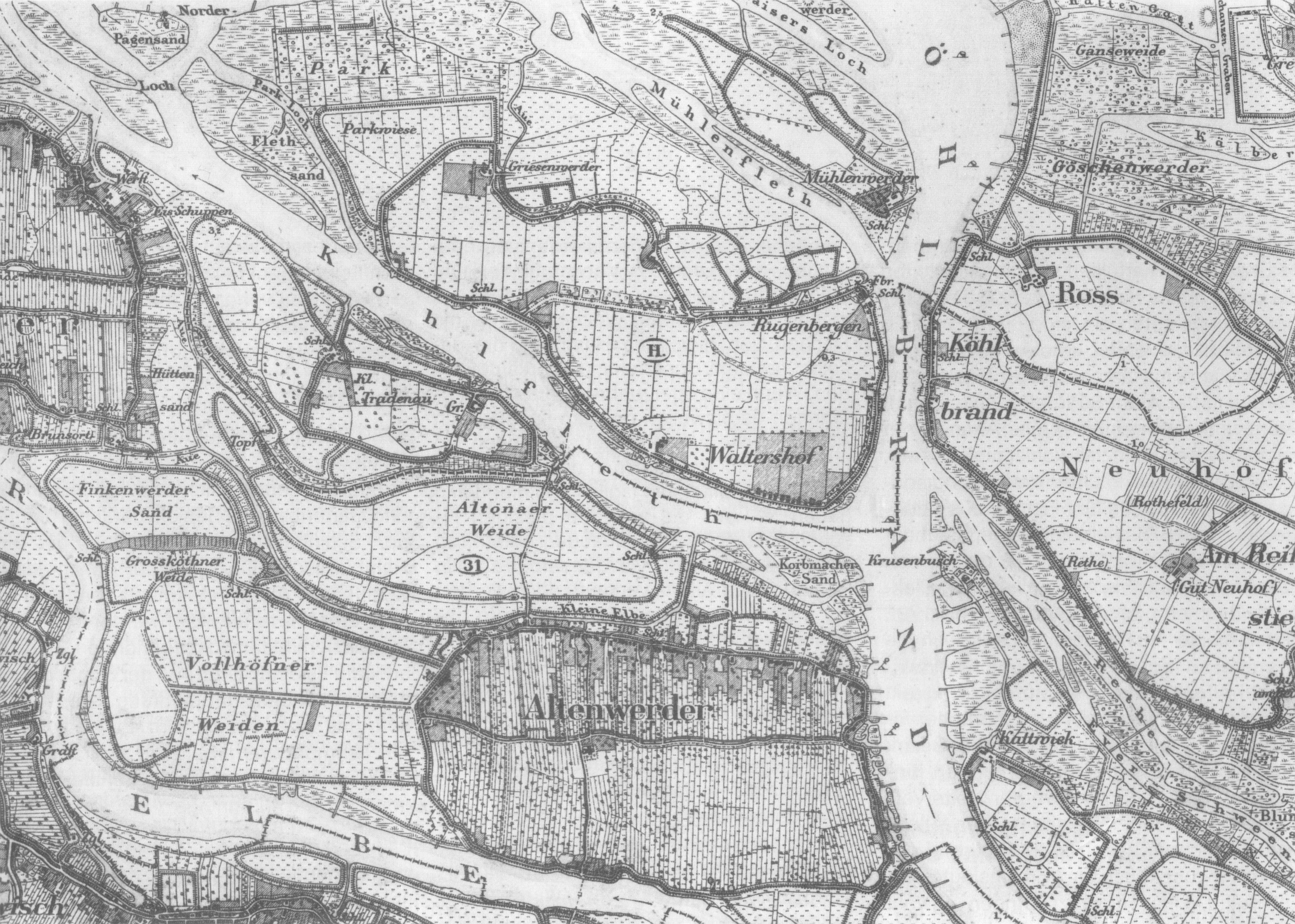 Karte von Hamburg-Altenwerder, Dradenau, Waltershof und Umgebung von 1878